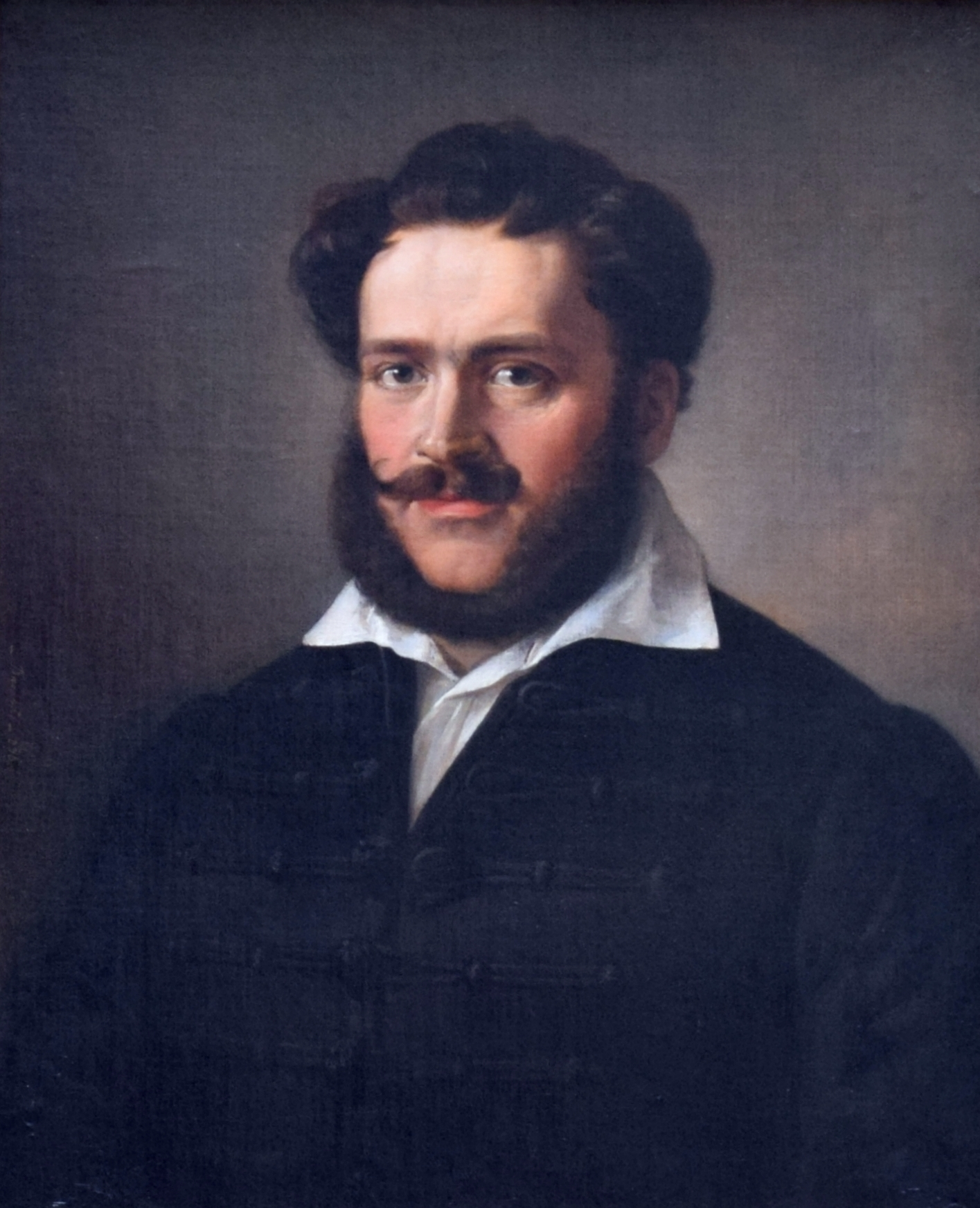 Portrait of Miklós Wesselényilabel QS:Len,"Portrait of Miklós Wesselényi"label QS:Lhu,"Wesselényi Miklós arcképe"